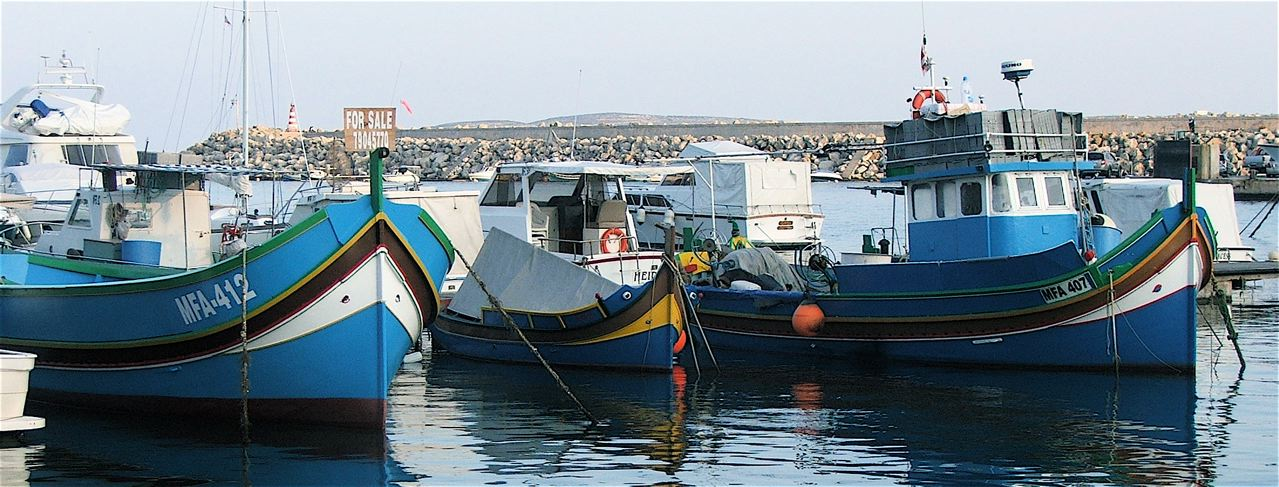 FISHING BOATS